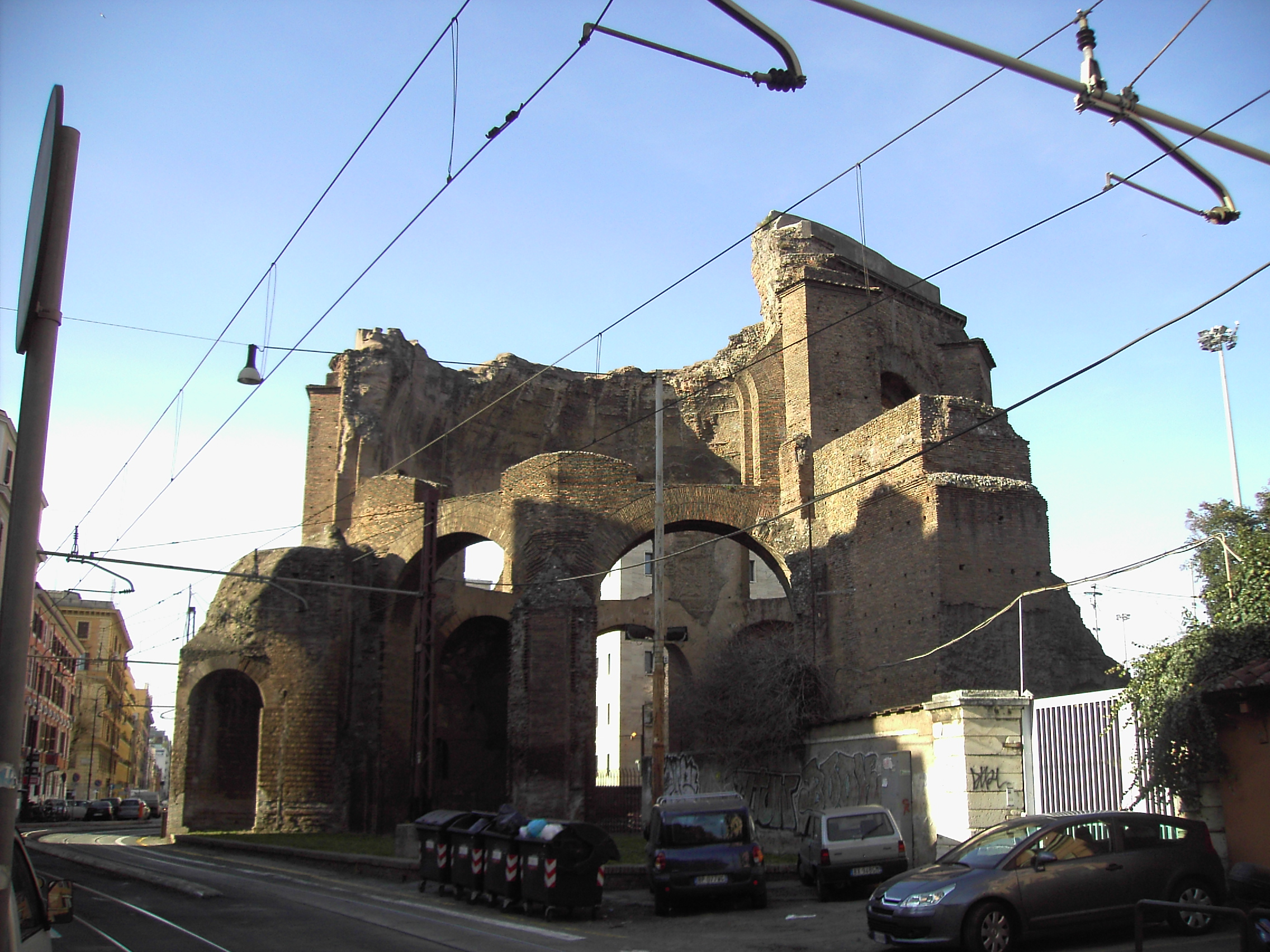 Roma, via Marsala: il cosiddetto "Tempio di Minerva Medica" (in realtà un ninfeo degli Horti Liciniani di epoca imperiale romana)